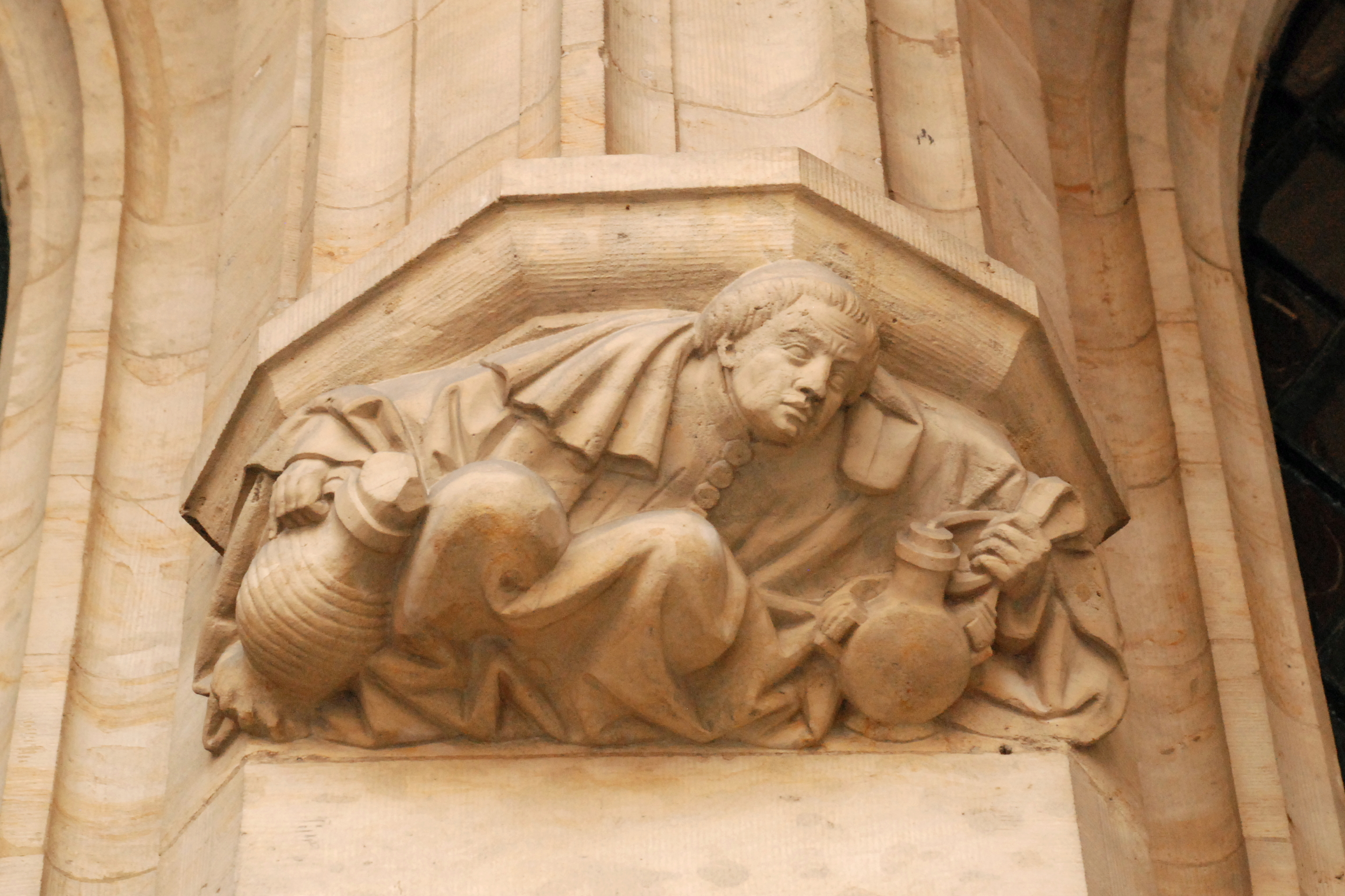 Belgique - Bruxelles - Grand-Place - Hôtel de ville - Cellier des Moines